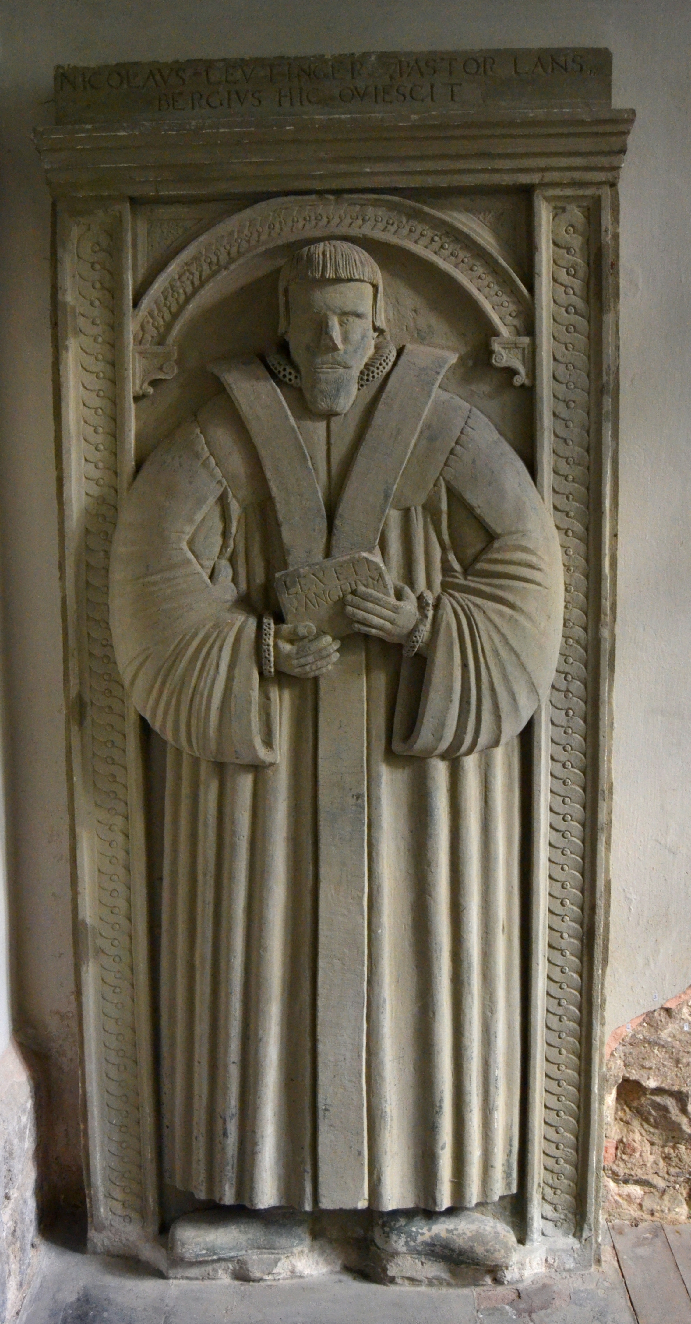 Stadtpfarrkirche St. Marien in Altlandsberg. Die evangelische Stadtpfarrkirche stammt aus der Mitte des 13. Jahrhunderts. Im Jahre 1725 wurde die Sakristei und die Bibliothek angebaut. Die Kanzel stammt aus der Zeit um 1600.